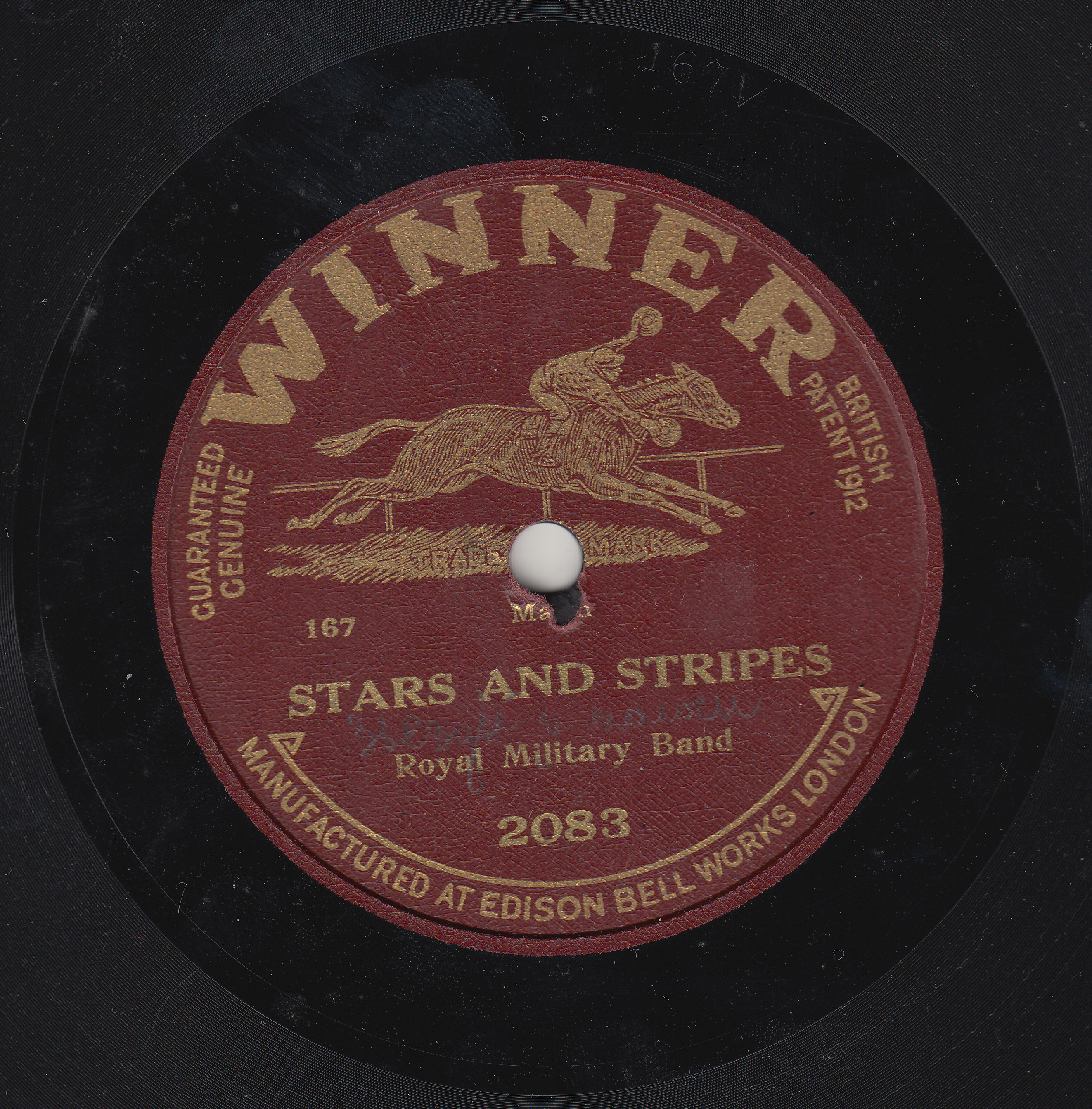 Грампластинка с записью национального марша США "Stars and Stripes"